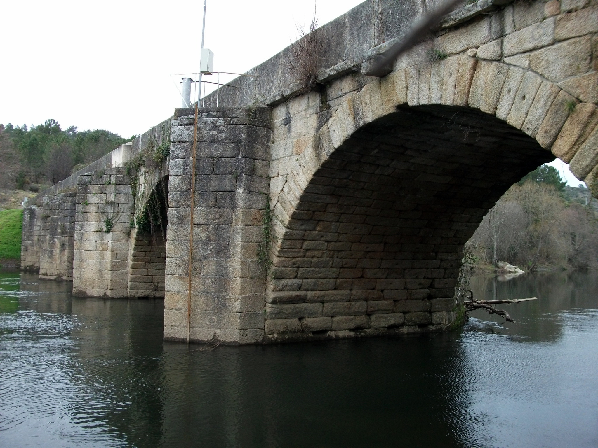 Vista a jusante na margem esquerda da "Ponte de pedra sobre o rio Tuela", também referida como "Ponte Românica sobre o rio Tuela" ou "Ponte de Torre de Dona Chama", na Estrada Nacional 206 em Torre de Dona Chama, Portugal.